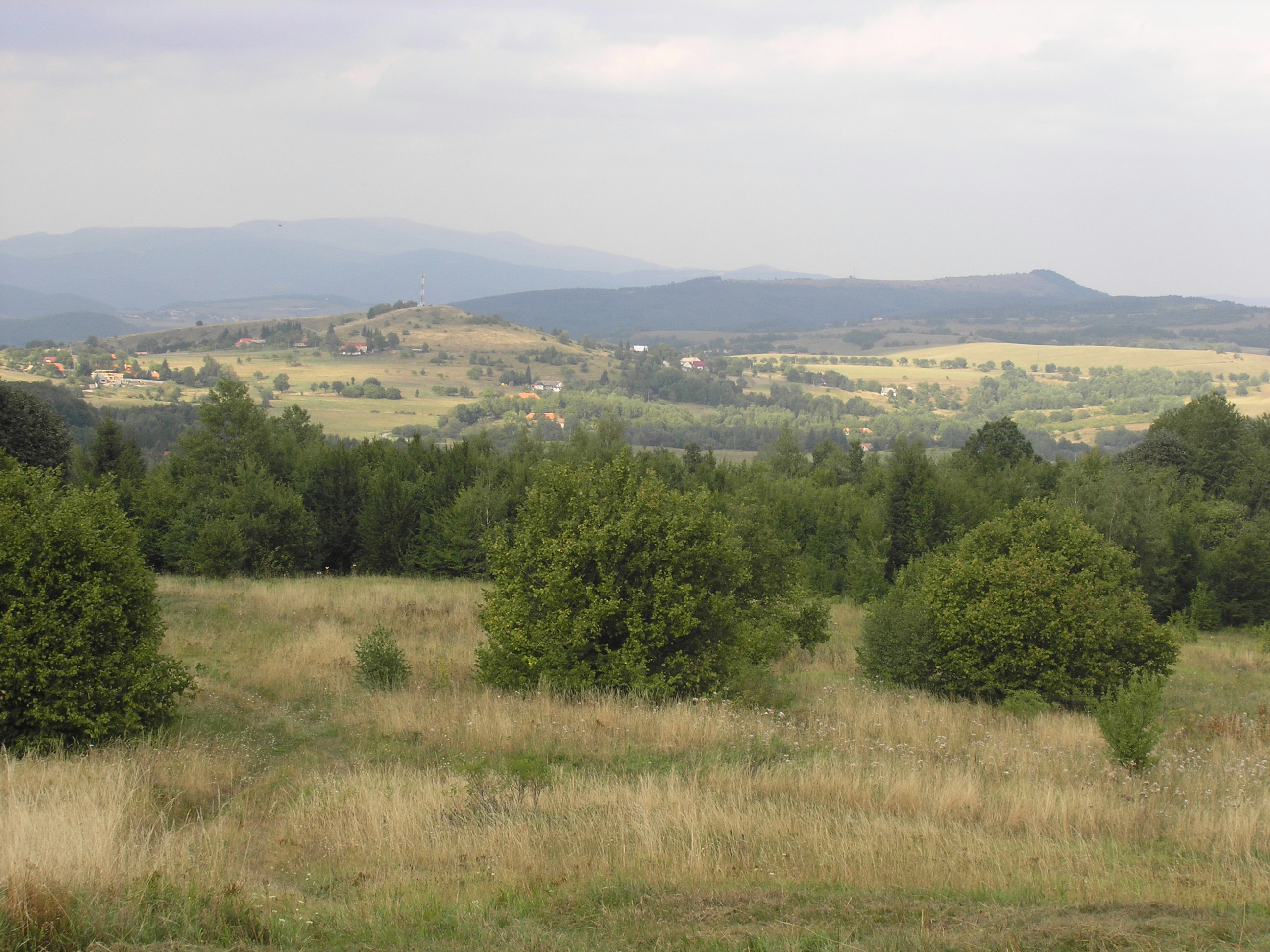 Pohronský Inovec - podcelek Lehotská planina